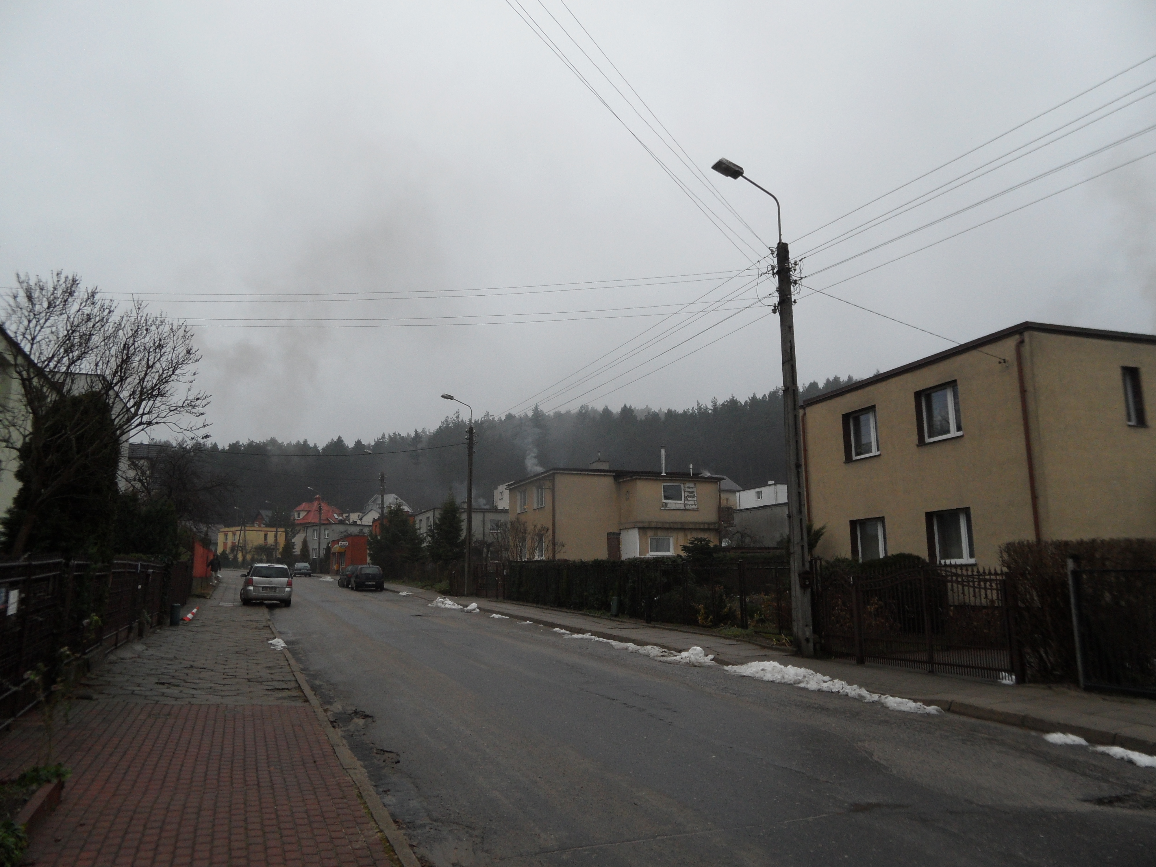 Ulica Robotnicza w Zagórzu (Rumia)